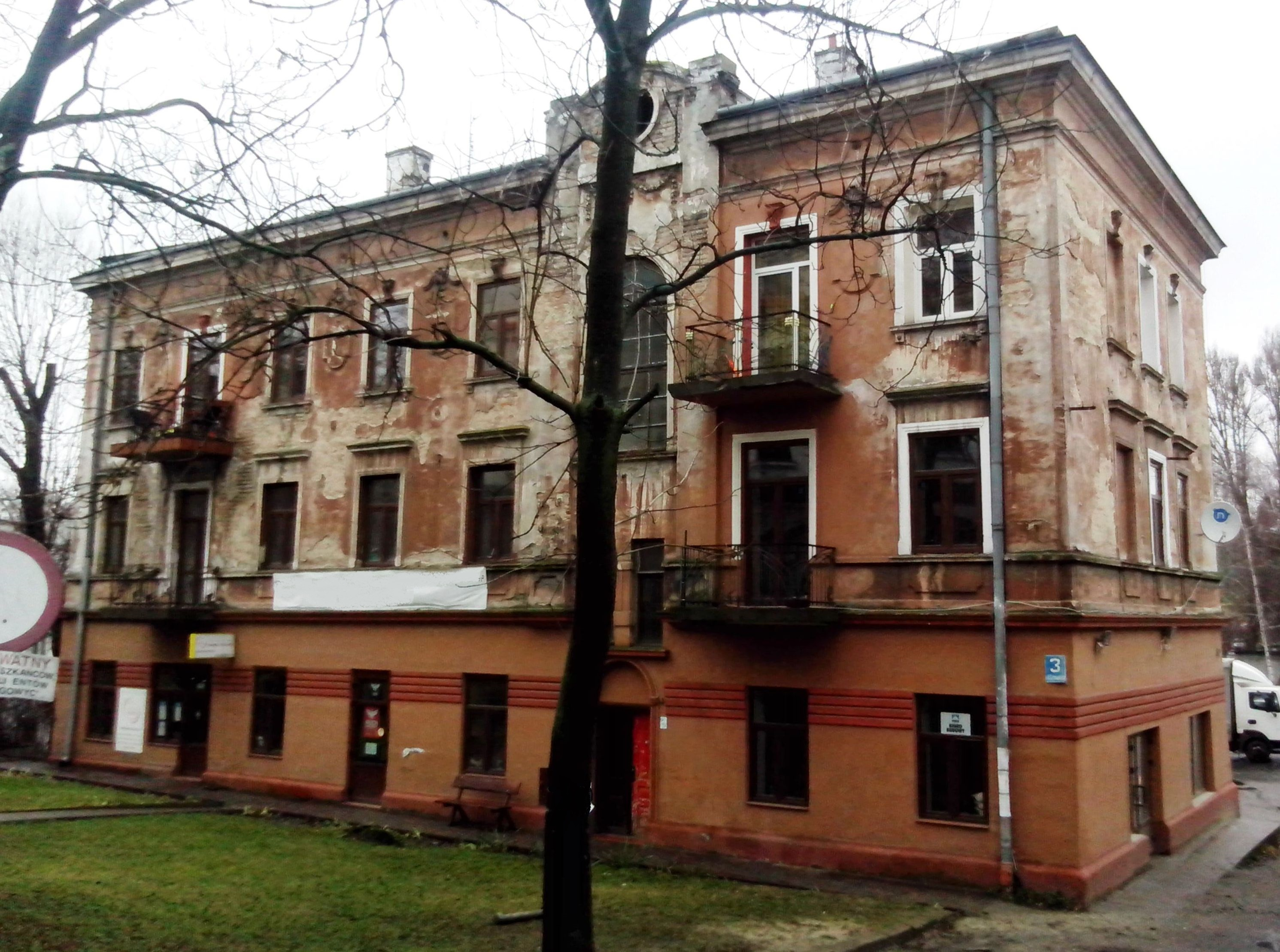 Будинок по вулиці Шевській, 3 в Любліні. До Другої світової війни тут мешкала родина Житомирських